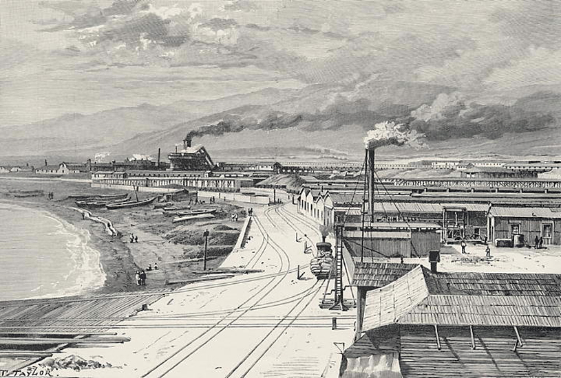 Esta postal corresponde a un dibujo impreso realizado por el británico T. Taylor en 1876 y que representa una vista parcial del Muelle e industrias del salitre en el borde costero de la ciudad de Antofagasta. El Muelle Salitrero Compañía Melbourne Clark, más conocido como Muelle Histórico, es un antiguo muelle de embarcaciones menores, localizado en el Barrio Histórico de la ciudad. Fue declarado el 12 de julio de 1978 como Monumento histórico nacional, según el Decreto Supremo Nº 0980 del Consejo de Monumentos Nacionales de Chile. Junto con el Embarcadero Miraflores, hoy propiedad del Club de Yates de Antofagasta, es el único muelle que se mantiene en Antofagasta como un registro histórico de la época del salitre. En 1872 la Compañía Melbourne Clark, de intereses chilenos y británicos, comenzó la construcción del Muelle Salitrero Compañía Melbourne Clark, con el fin de levantar el primer muelle de carga para el transporte del salitre de la ciudad. Se inauguró en 1880. El cargamento del mineral se realizaba por medio de embarcaciones menores, ya que el muelle no estaba destinado para la llegada de buques de mayor envergadura. La creciente necesidad de transporte, llevó a utilizarlo también como muelle de pasajeros. En 1885 pasó a llamarse Muelle Oficial de la Compañía de Salitres y Ferrocarriles de Antofagasta tras ser traspasado a la Minera de Huanchaca de Bolivia. En 1888 pasó a manos de The Antofagasta and Bolivia Railway Co. Ltda.